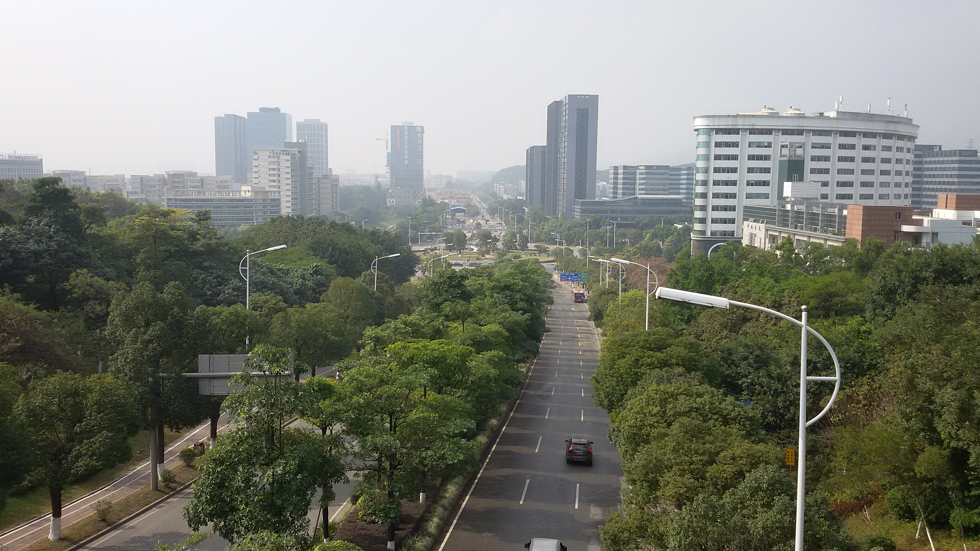 粵語: 从科学城玉树公园同科学城体育公园之间条桥向西望出去科学大道嗰边